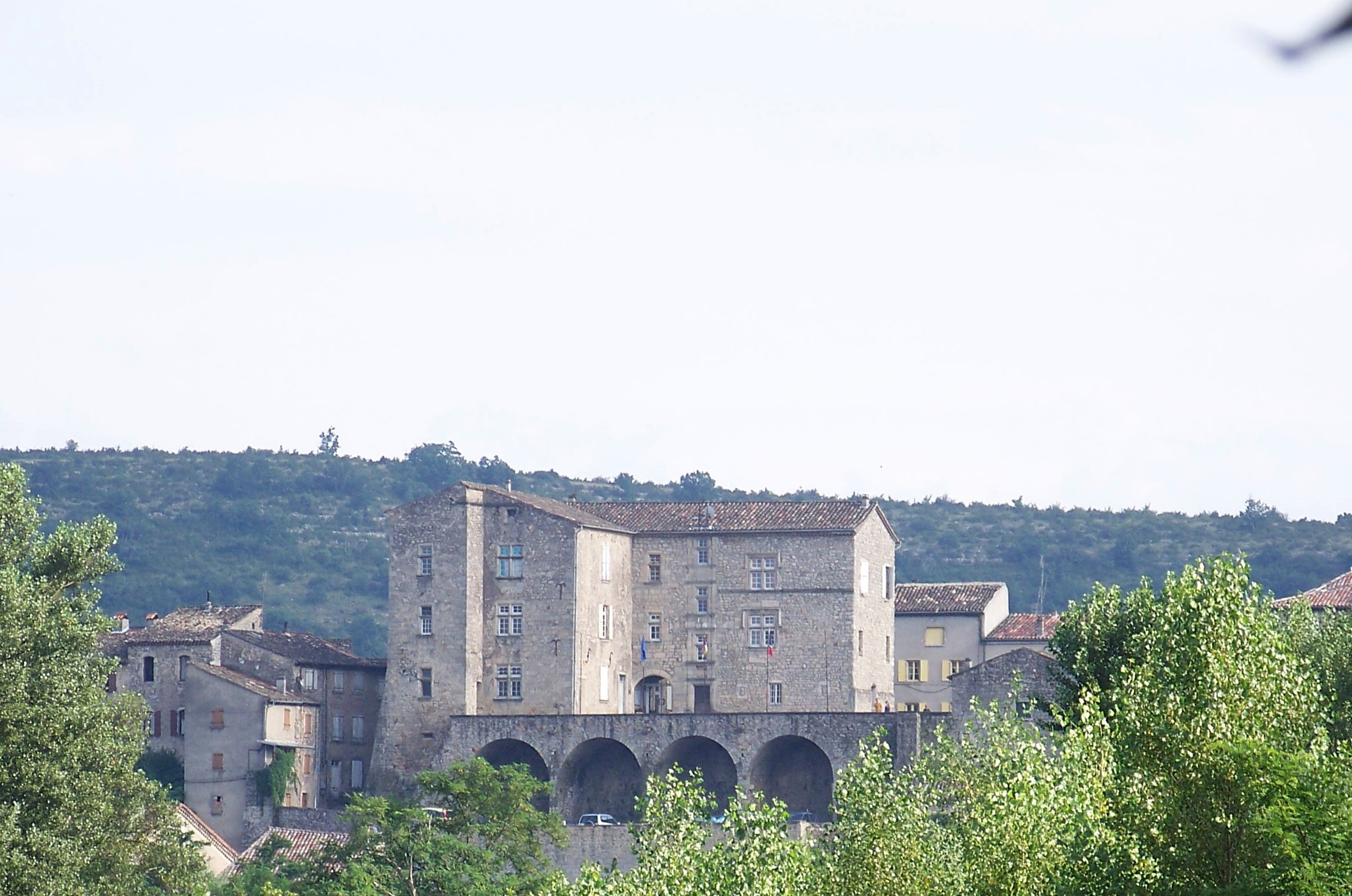 Joyeuse dans le département français de l'Ardèche : Le château façade Nord.